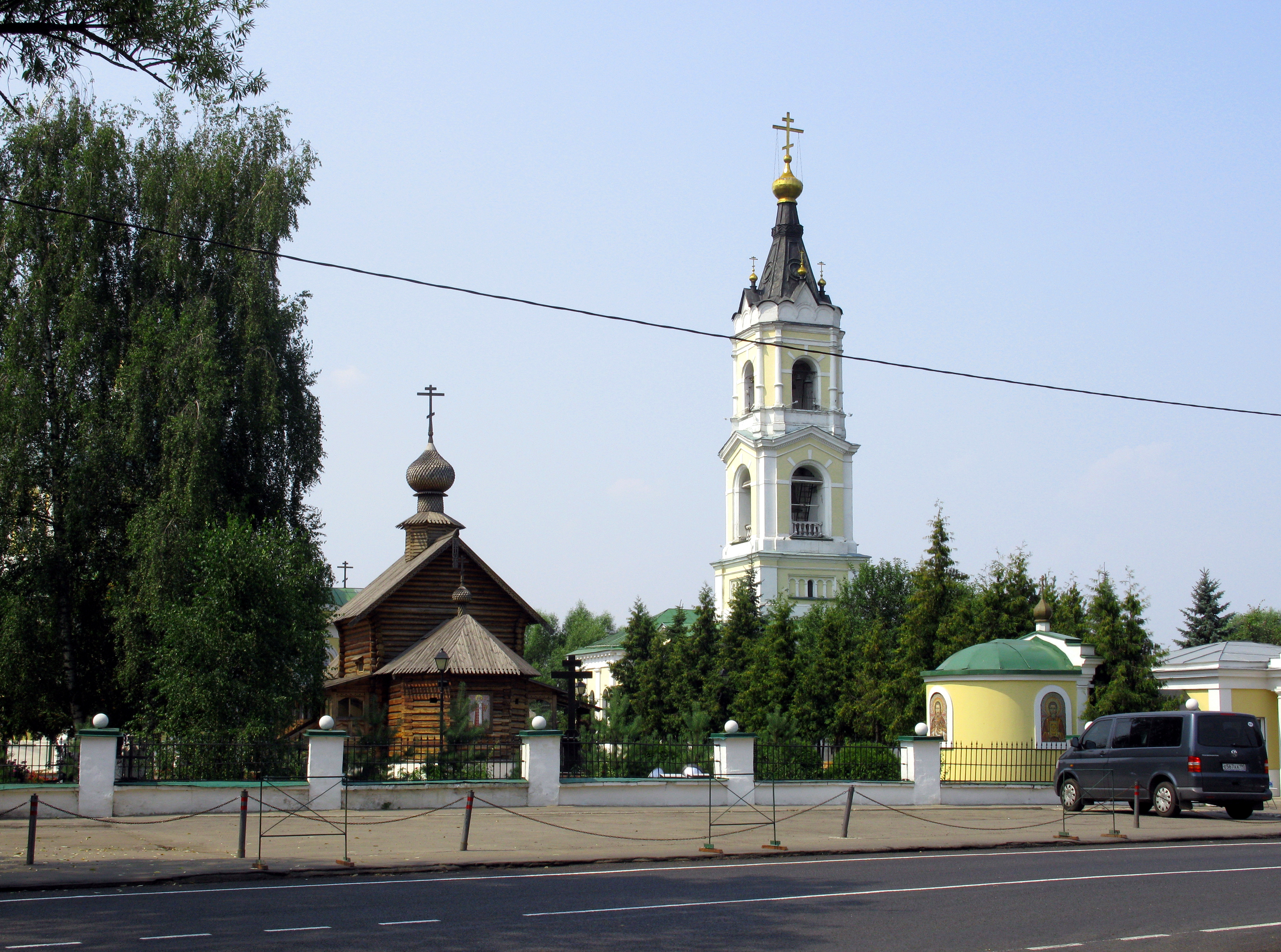 Храмовый комплекс в Косине (Москва, Большая Косинская ул., 29).